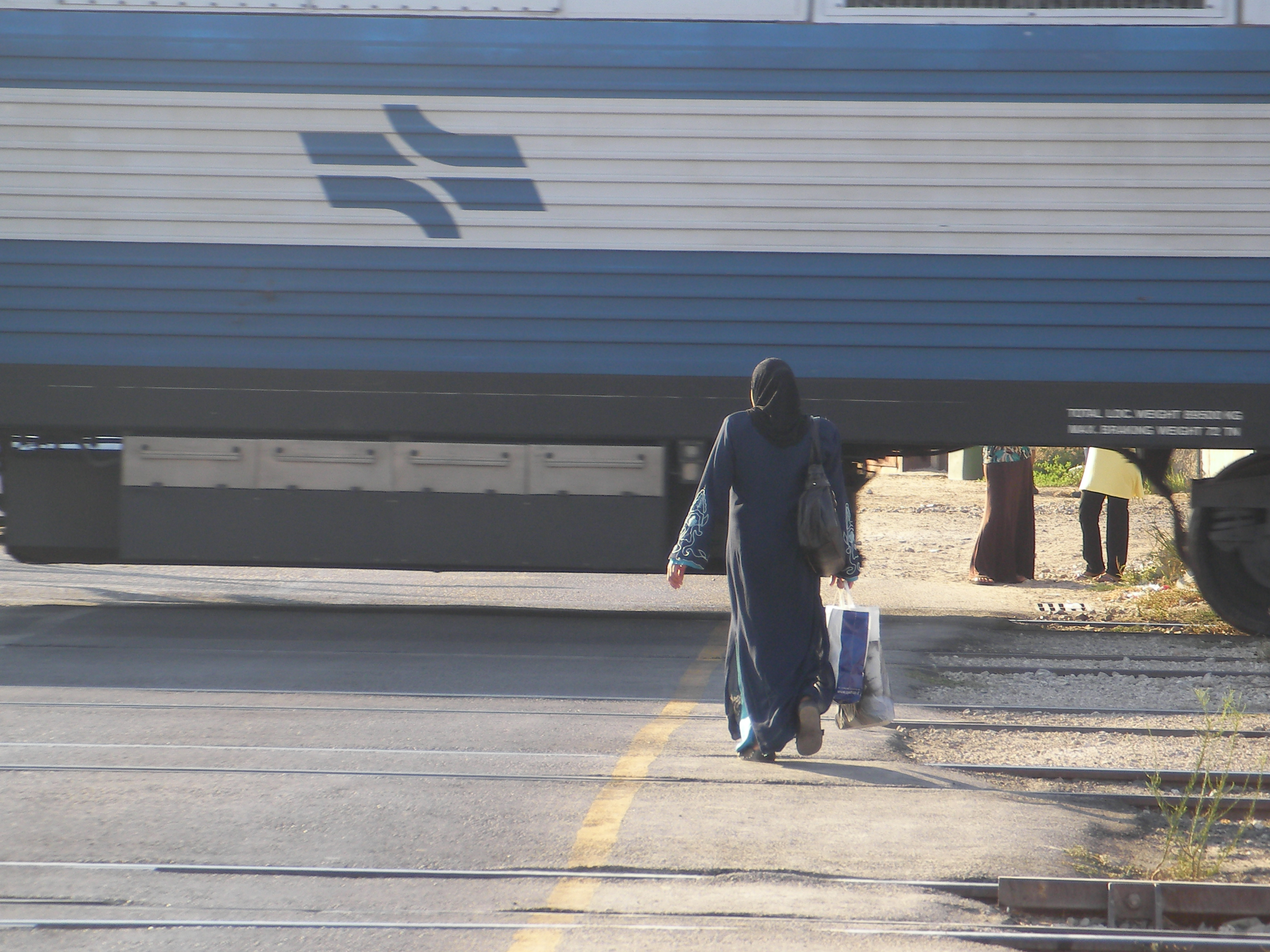 Lod Israel